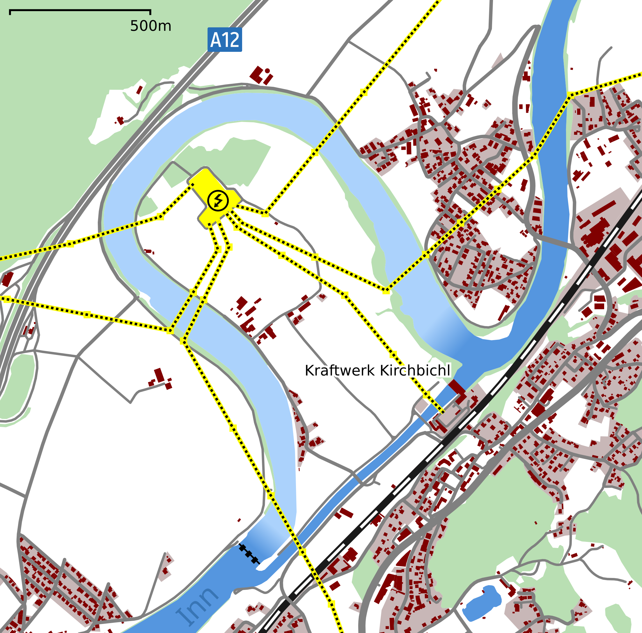 Karte der Anlagen des Kraftwerks Kirchbichl